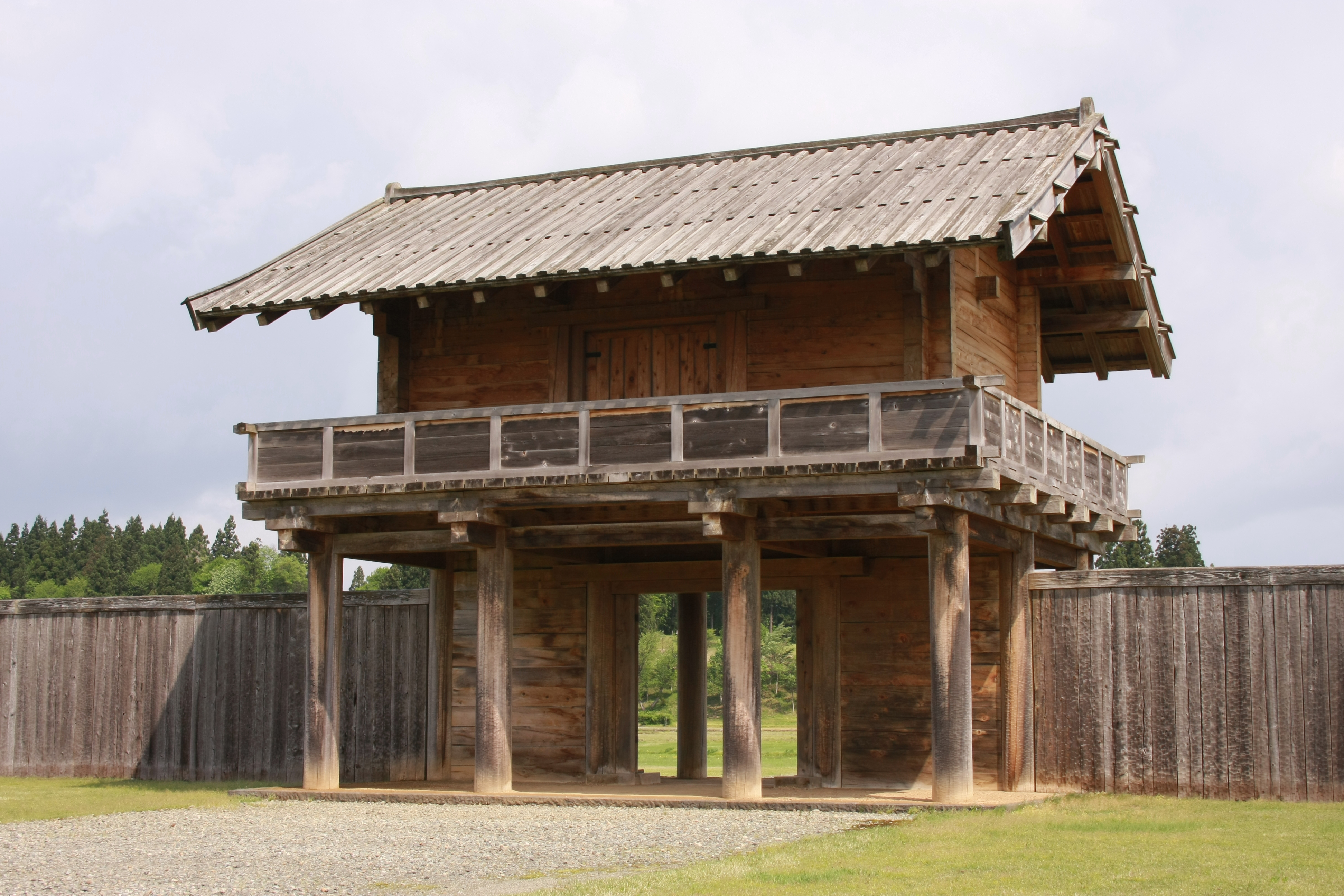 払田柵の外柵南門